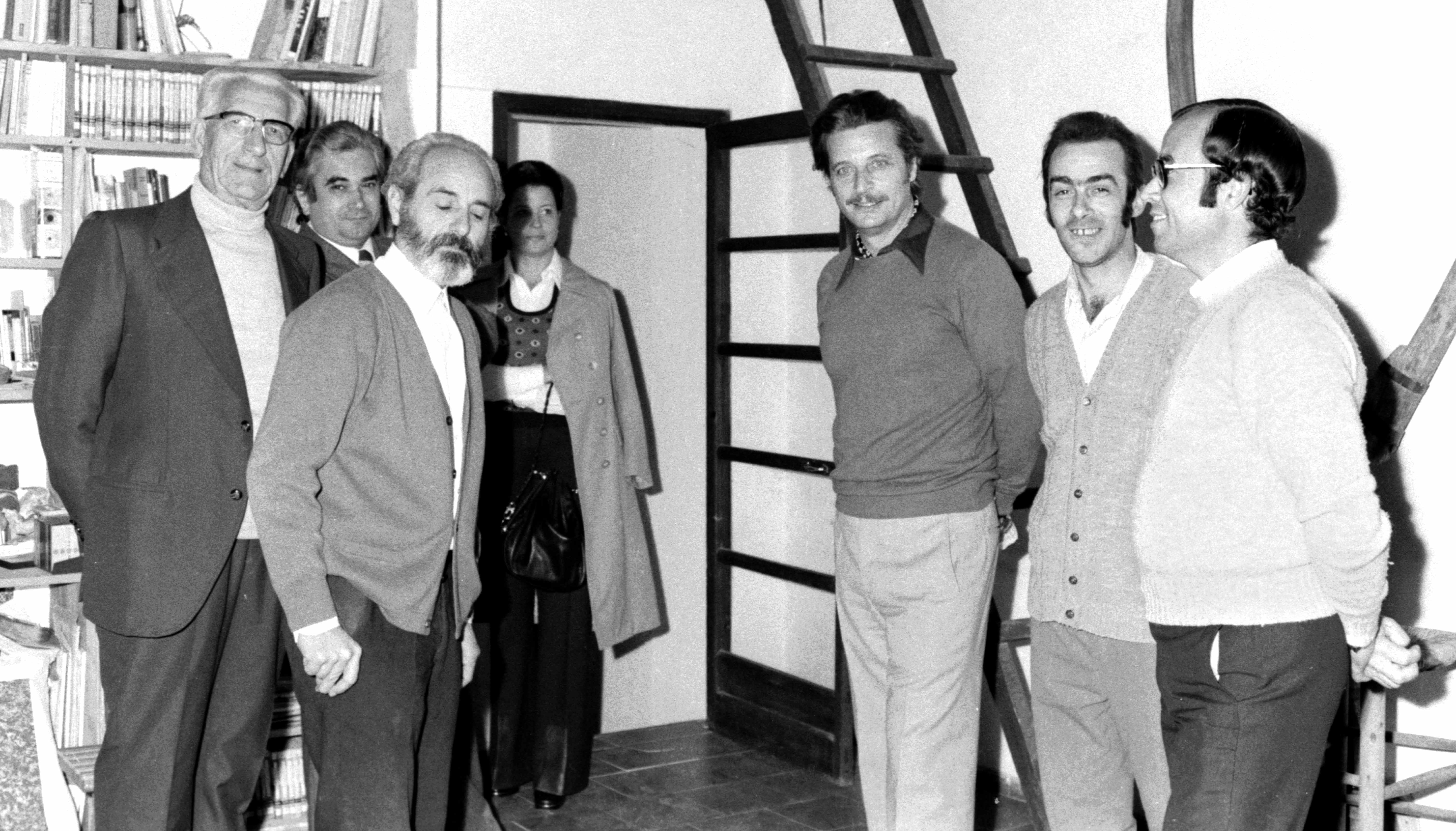 L'Arxiu allibera avui aquesta imatge feta per Ismael Latorre Mendoza el 15-11-1973 en casa del pintor José Espert Climent. L'Arxiu conserva 12 negatius d'aquesta trobada entre el cantant i el pintor. A més, a la fotografia s'hi pot veure la dona de Kraus, el mestre Rafael Hervás, Vicent Espí i altres veïns d'Alginet. Aquesta fotografia es va publicar en: Fornés, Alberto; Císcar, José i Latorre, Ismael: Alginet, històries, costums i altres relats, Societat Cultural Alèdua, Alginet, 2003. Dipòsit Legal: V-2546-2003, a la pàgina 88. Tractament digital: Vicenç Salvador Torres Guerola.